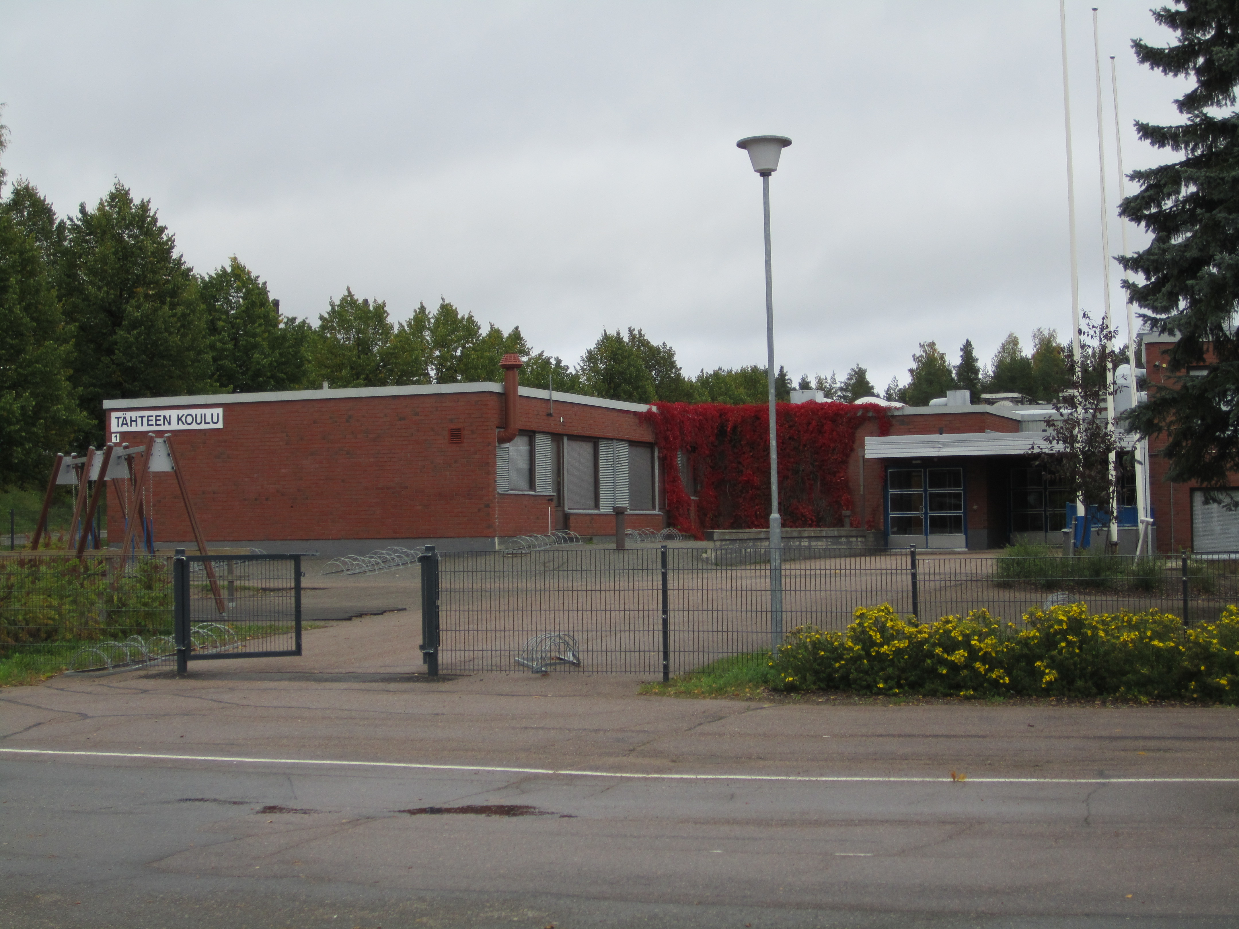 Tähteen koulu, Kouvola